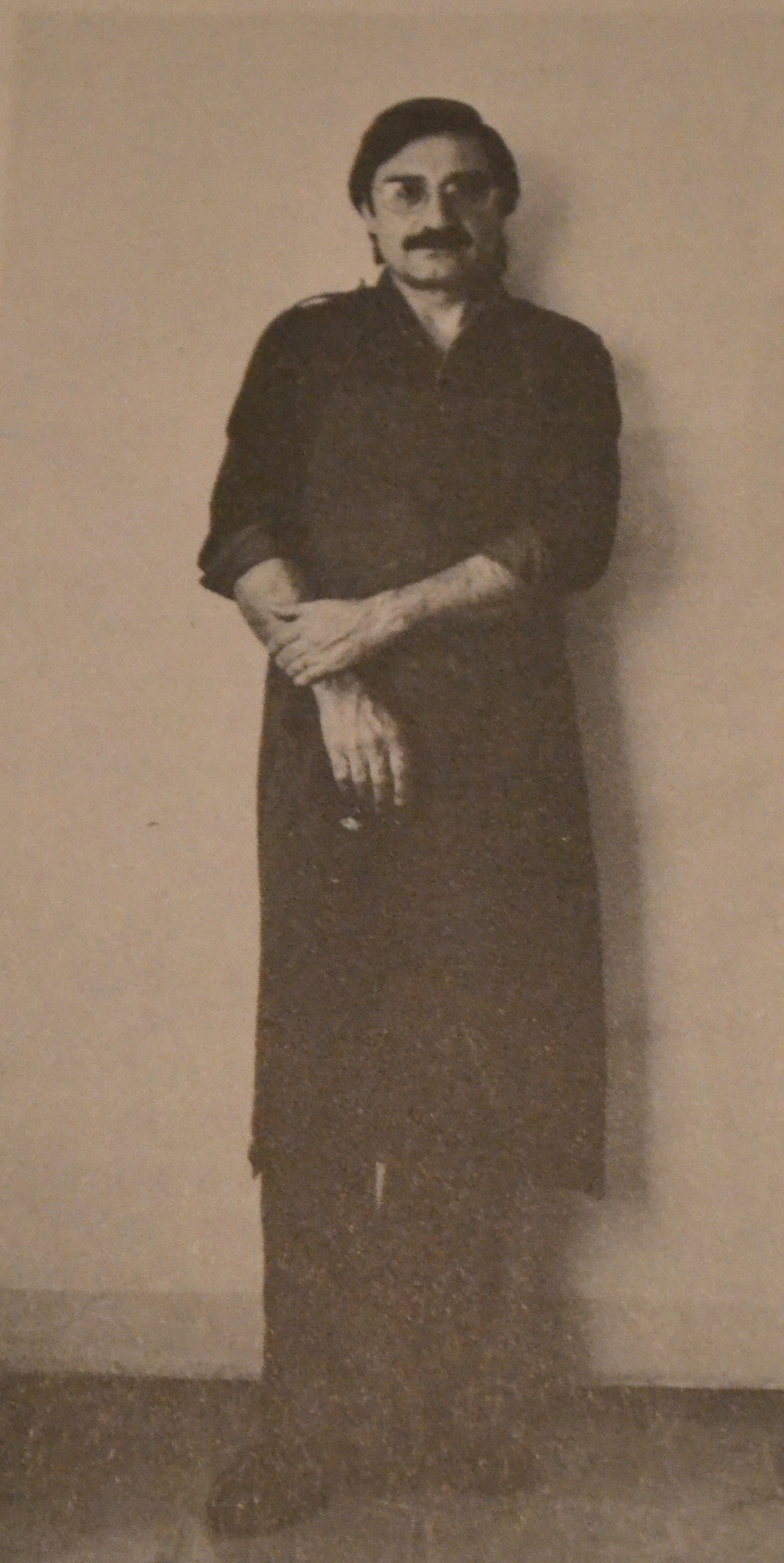 Juan Carlos Distéfano